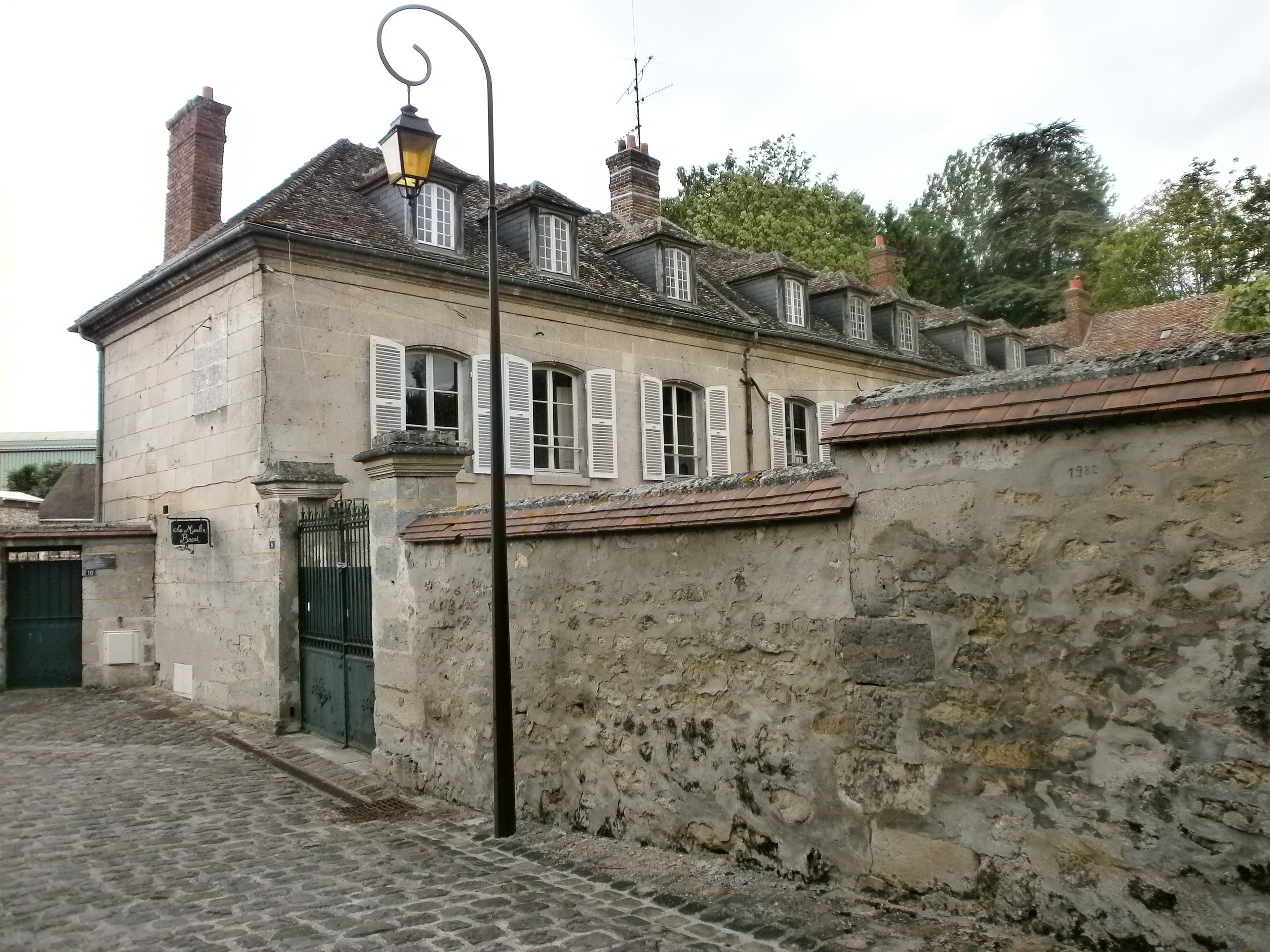 Le moulin Bacot, ancien moulin à eau de Clairoix